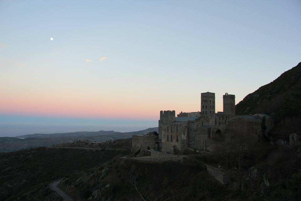 Monasterio de Sant Pere de Rodes al atardecer